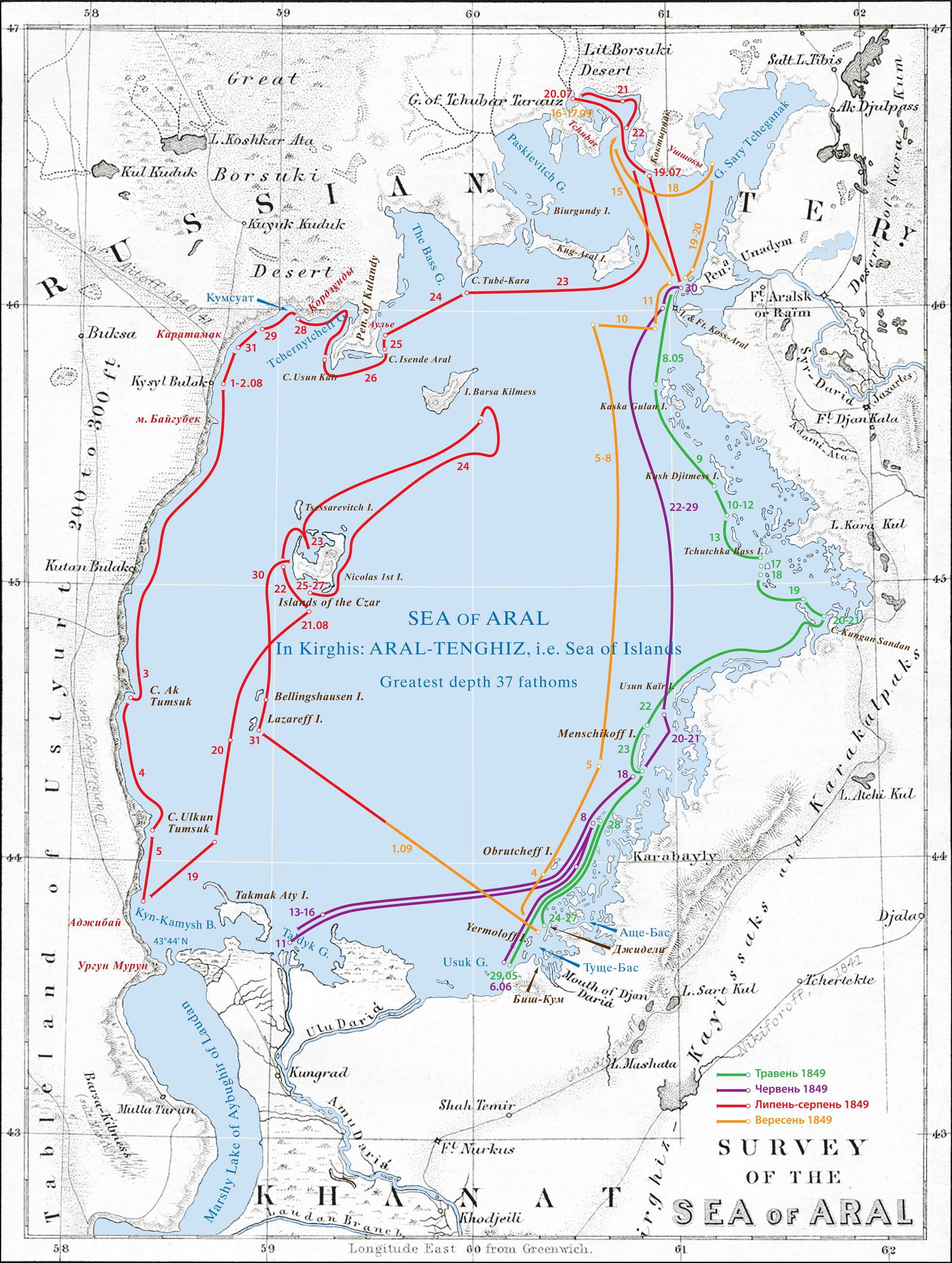 Кампаня О. Бутакова 1849 р. на шкуні «Костянтин». Аральське море